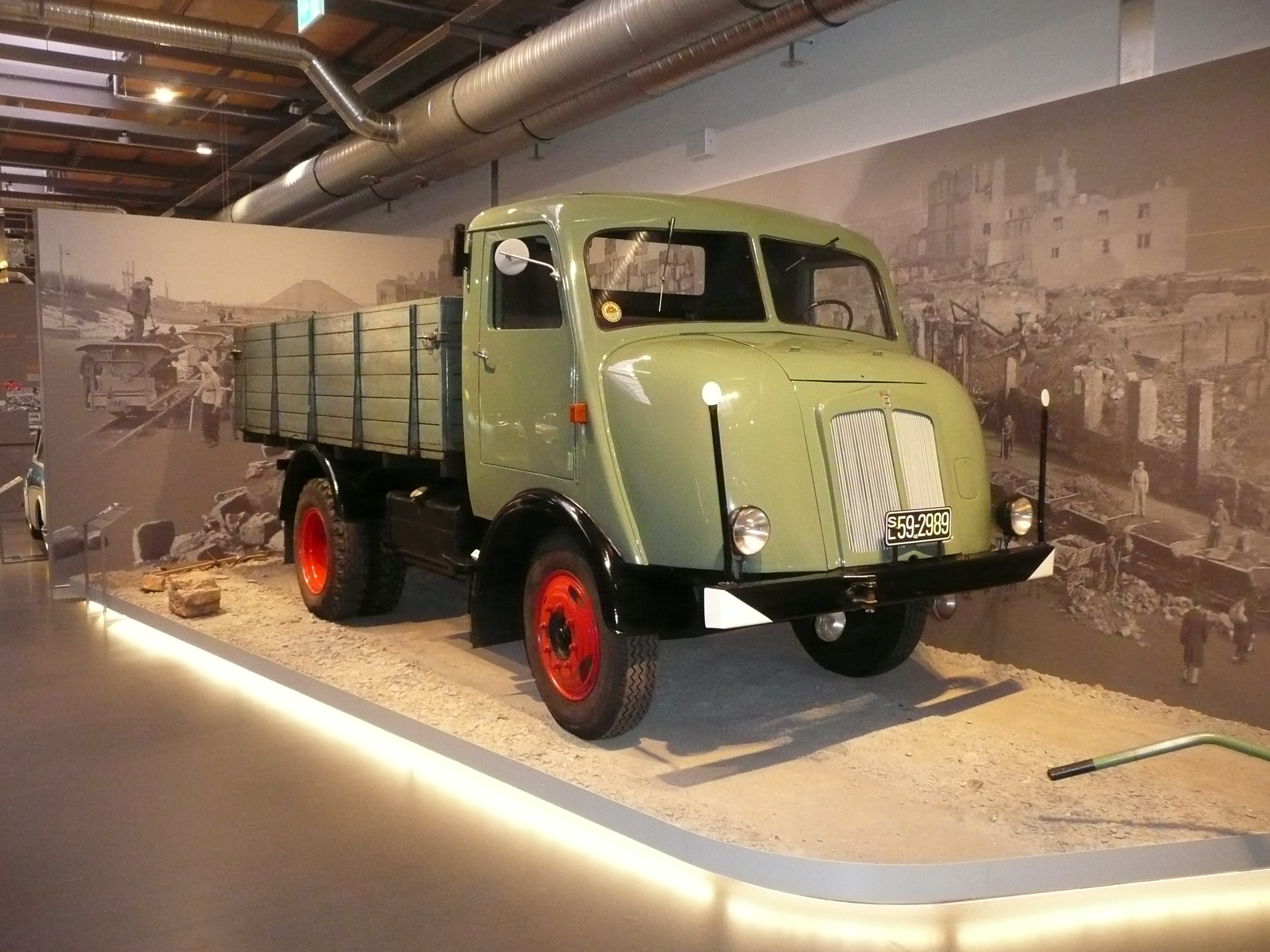 LKW Horch H3 aus dem Jahr 1948 im August´-Horch-Museum Zwickau